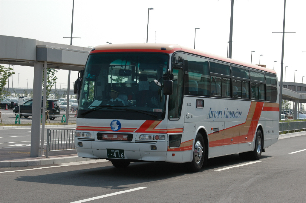 神戸空港にて撮影